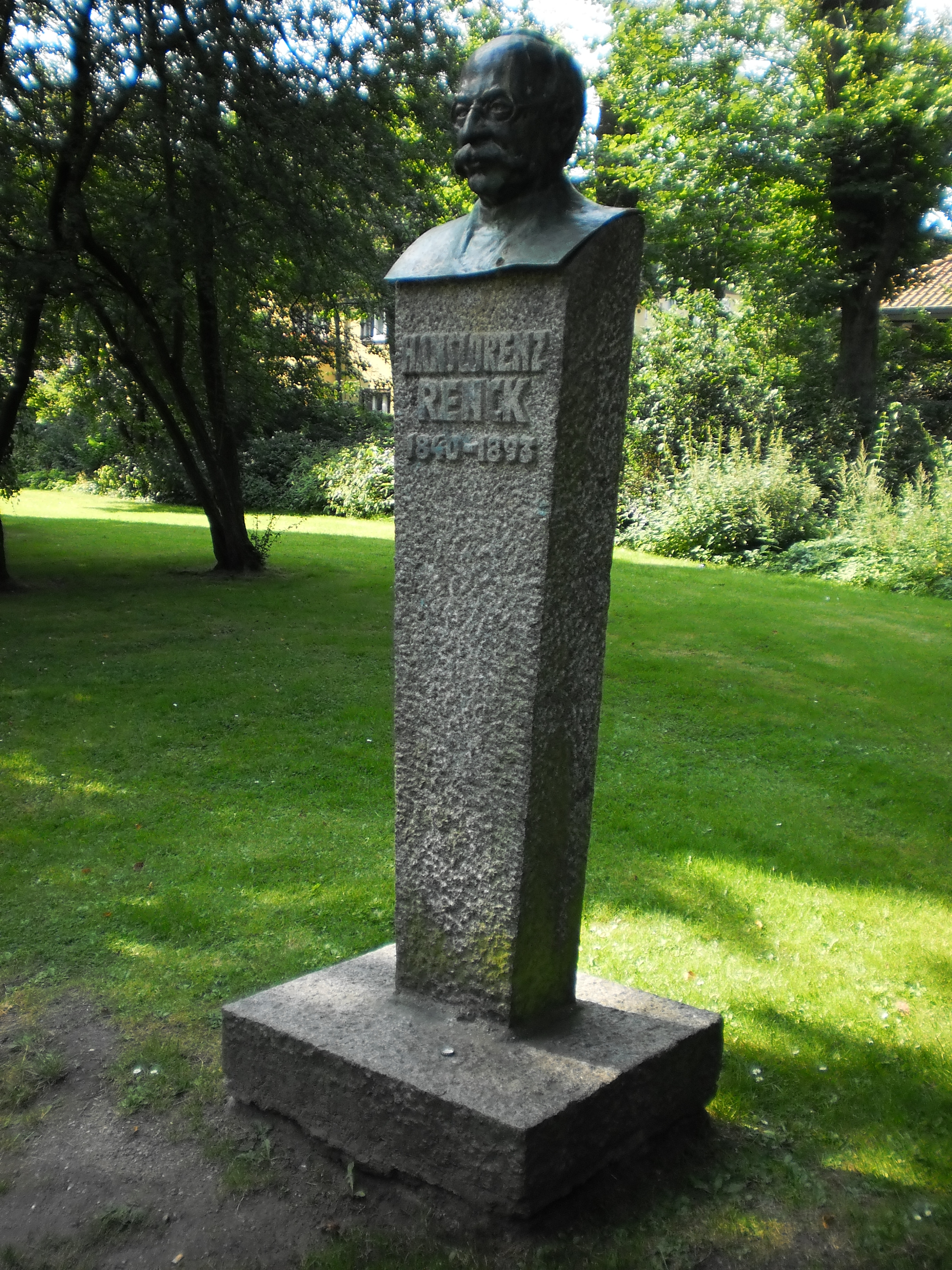 Rencks Park in Neumünster mit Büste "H.L.Renck" von Georg Fuhg